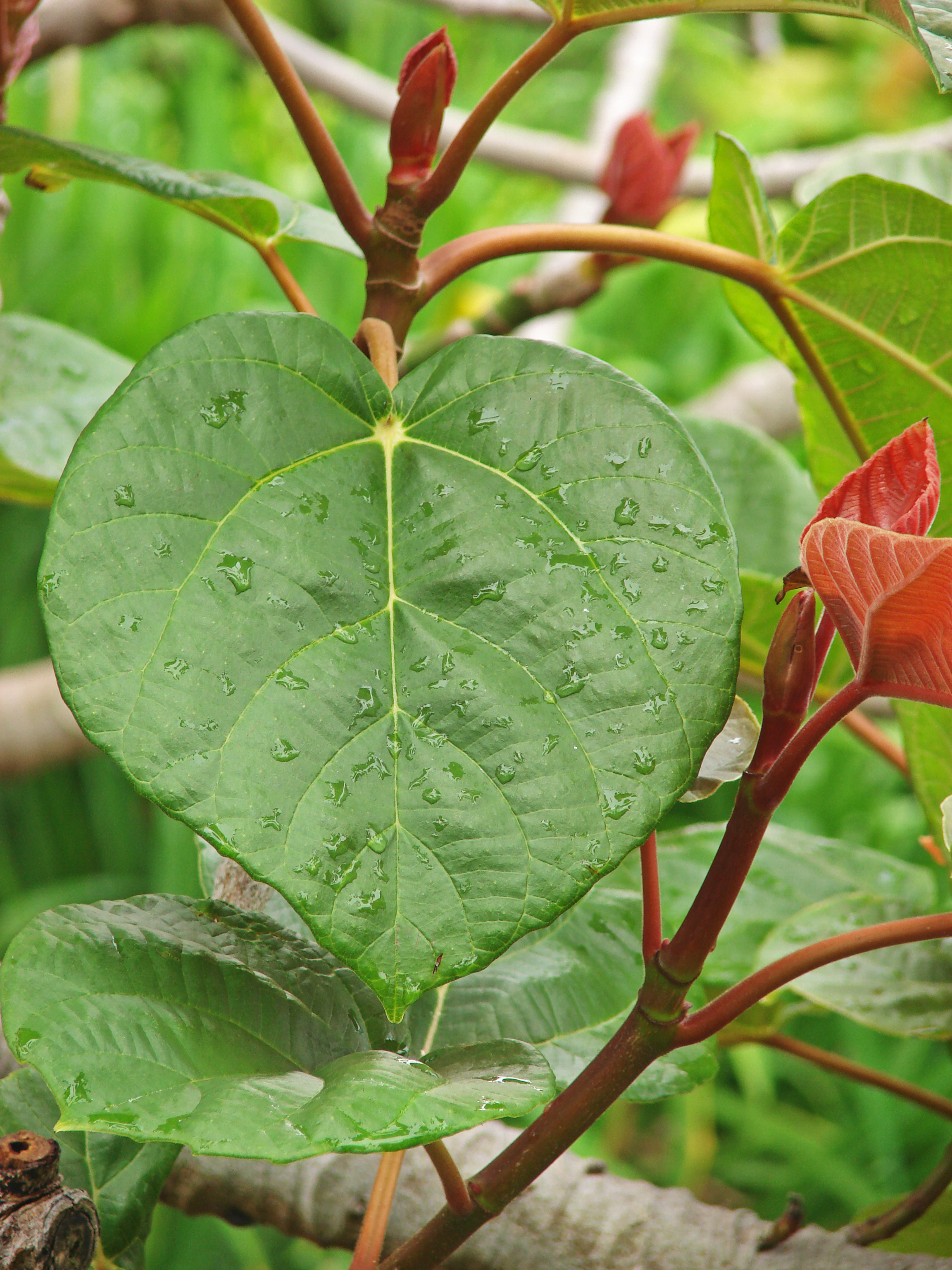 Himalaya-Feige, Ficus auriculata (Lour.), Moraceae , älteres Blatt